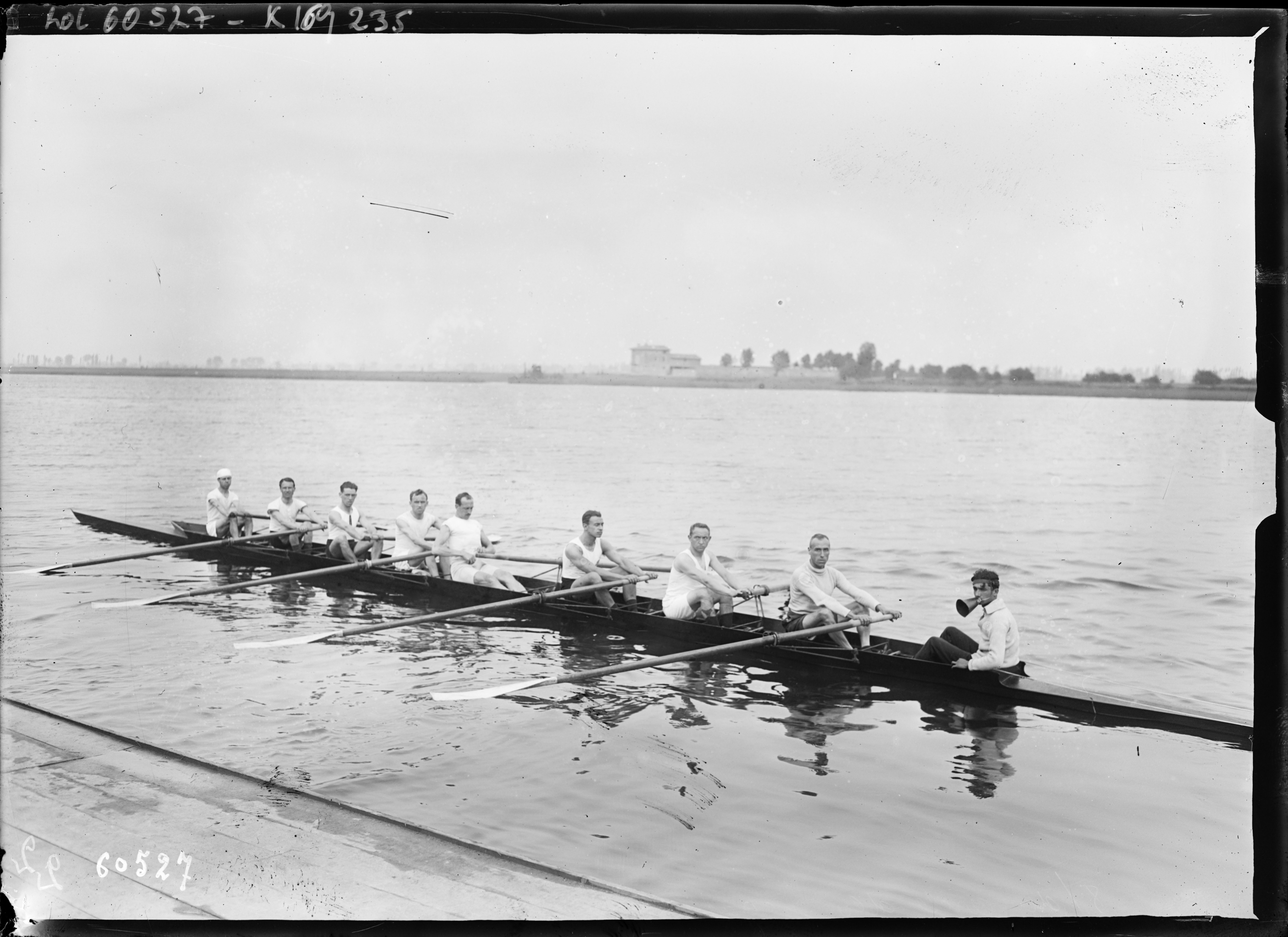 8 du cercle des régates de Bruxelles [15/8/20, Mâcon, championnats d'Europe d'aviron] : [photographie de presse] / [Agence Rol]